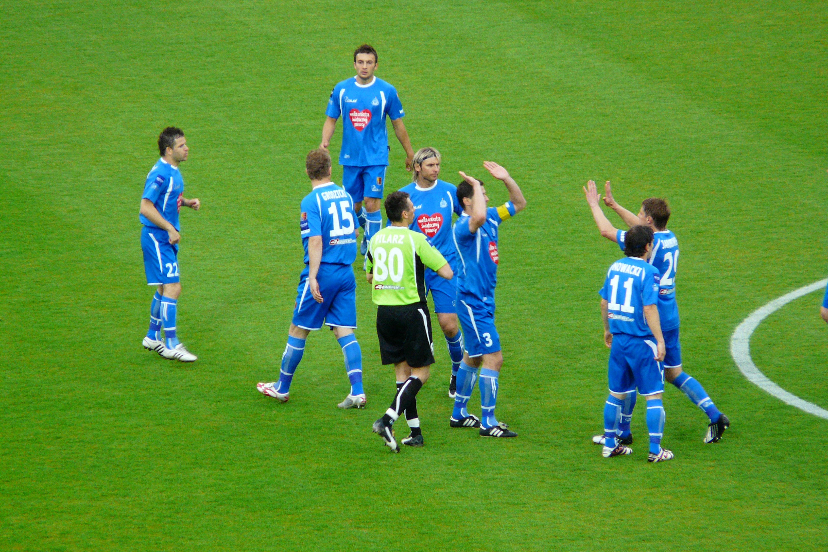 Piłkarze Ruchu Chorzów w meczu z Legią Warszawa (półfinał PP)